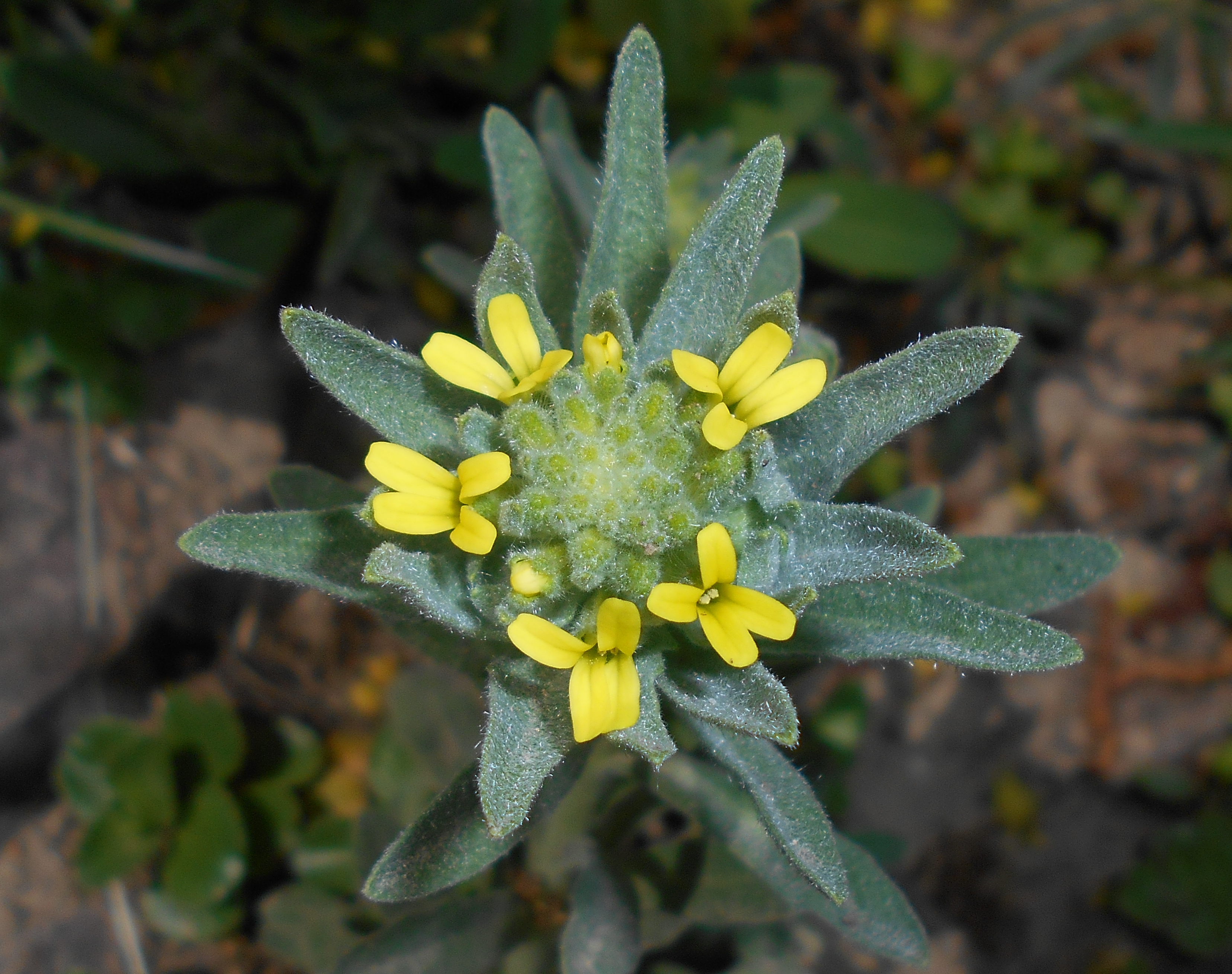 Fibigia tarczowata (Fibigia clypeata), Ogród Botaniczny UMCS w Lublinie.